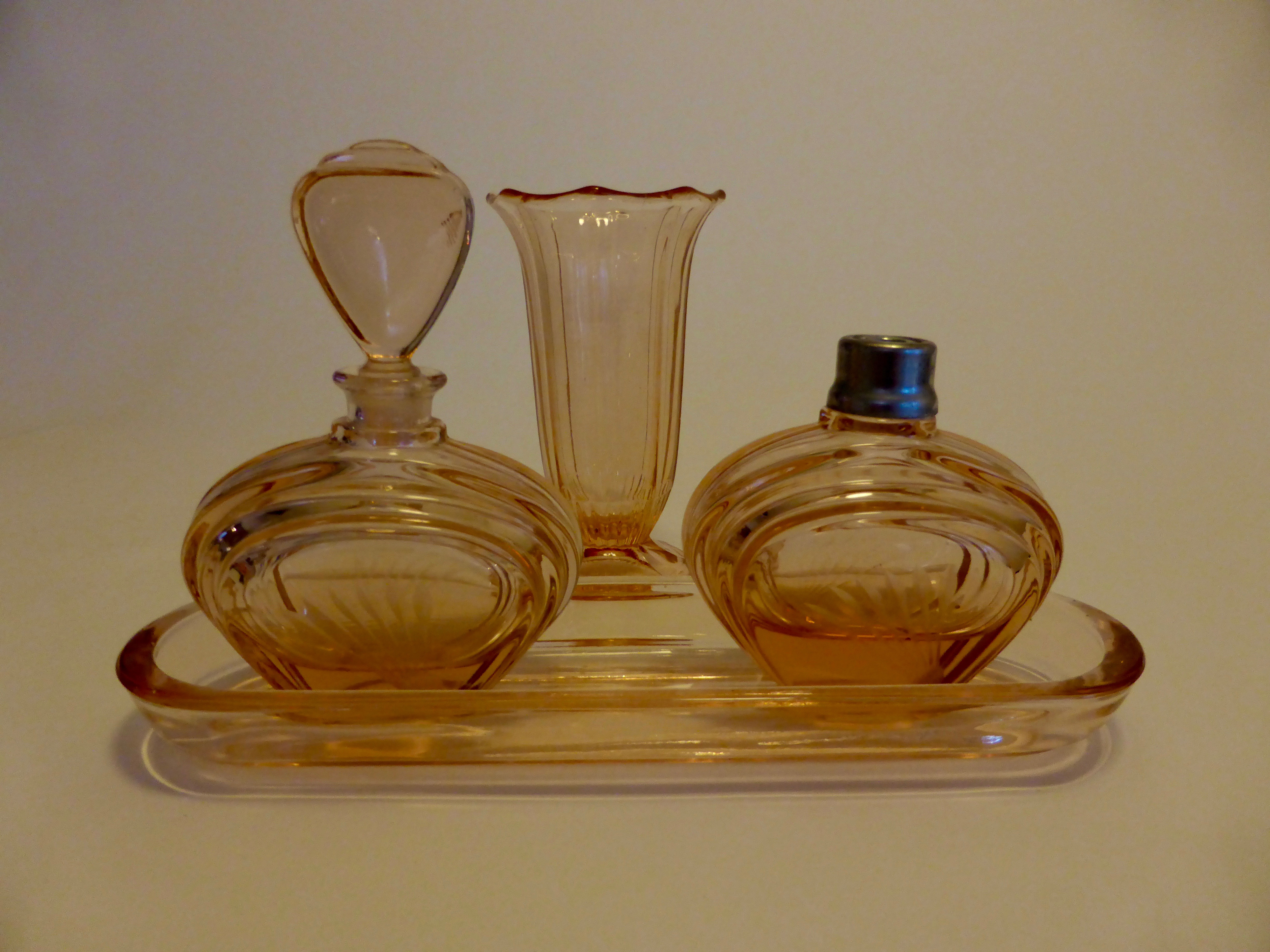 Rosalinglas-Flacon (Privatsammlung).